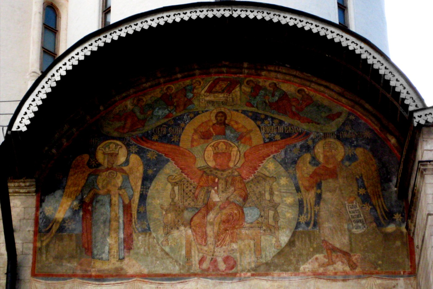 Фрески при входе в Успенский собор София Премудрость Божия. Фреска восточного фасада Успенского собора. На восточном фасаде Успенского собора росписи располагаются в полукруглых люнетах под закомарами над алтарными апсидами. Над центральной апсидой представлена «Новозаветная Троица», слева от нее – «Похвала Богоматери», а справа – «София Премудрость Божия». Иконография «Новозаветной Троицы», изображающая Бога-Отца, Бога-Сына и Святого Духа в виде голубя, появилась в конце XIV столетия. Но особое распространение она получила лишь в XVI–XVII веках, когда потребность в наглядном изображении сложных символических сюжетов преодолела прежние запреты церкви, не разрешавшей писать Бога Отца, которого никто не мог видеть, и единосущную Троицу иначе, чем в аллегорических и иносказательных образах. Это относится и к изображению огнеликого ангела – Софии Премудрости Божией, восседающей на престоле, опирающемся на семь столпов, согласно тексту притчи «Премудрость созда себе дом и утверди столпов седмь». По сторонам от нее стоят крылатые, словно непорочные, ангелы, Богоматерь и Иоанн Предтеча. Эти сюжеты были связаны своим происхождением с Новгородом, главный собор которого посвящен св. Софии. В нем находилась икона, послужившая образцом для фрески Успенского собора. Вероятно, эти изображения появились на стенах собора несколько позже, уже в середине XVI столетия, а затем также неоднократно поновлялись.